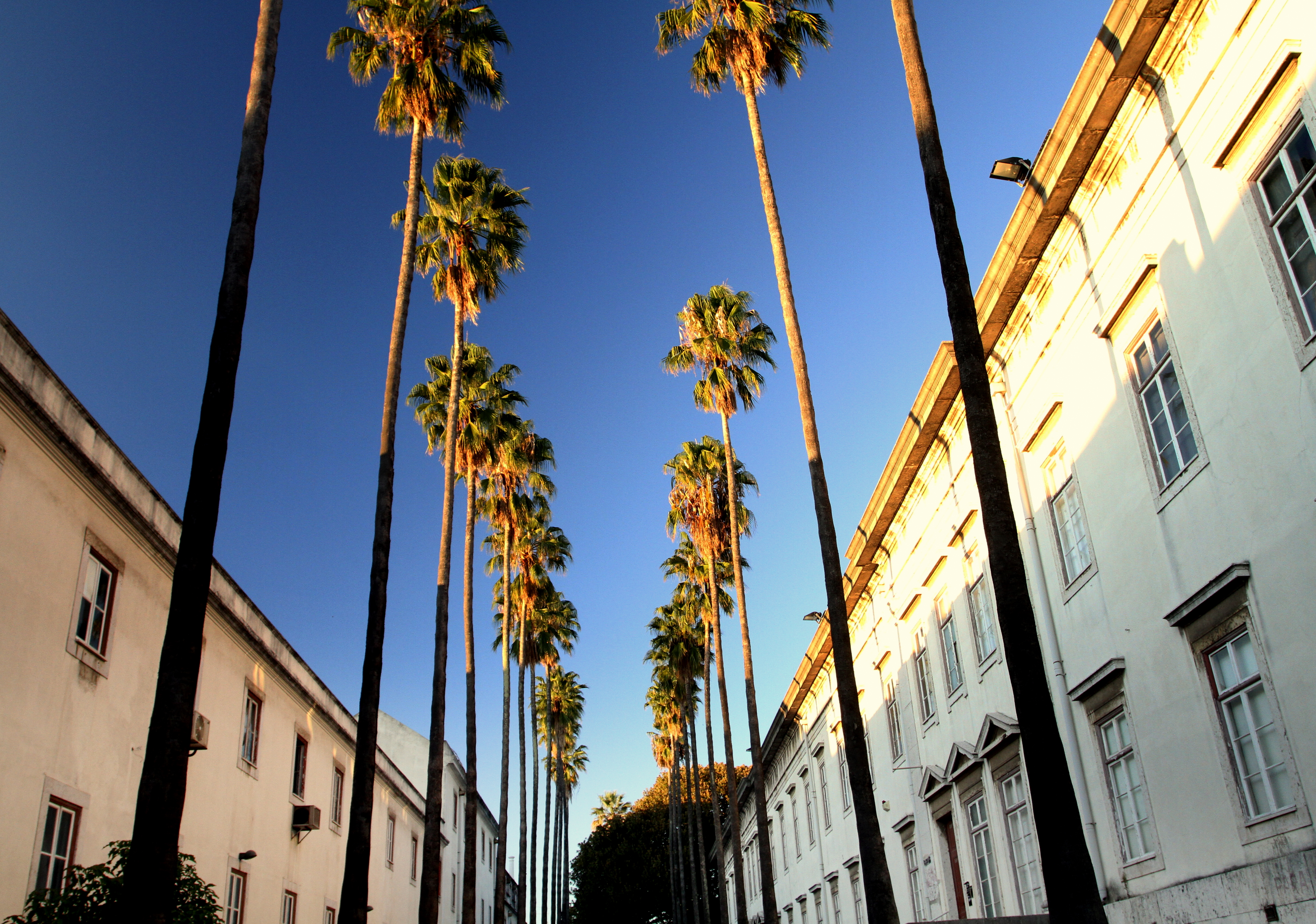 Jardim Botânico This file was uploaded for Wiki Loves Monuments in Portugal with the unique identifier 70142.